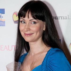 Нонна Гришаева на церемонии Top Beauty Awards 2010 в отеле «The Ritz-Carlton» 19 мая 2010 года